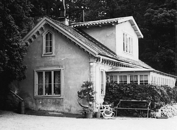 Ulriksdals för detta maskinhus